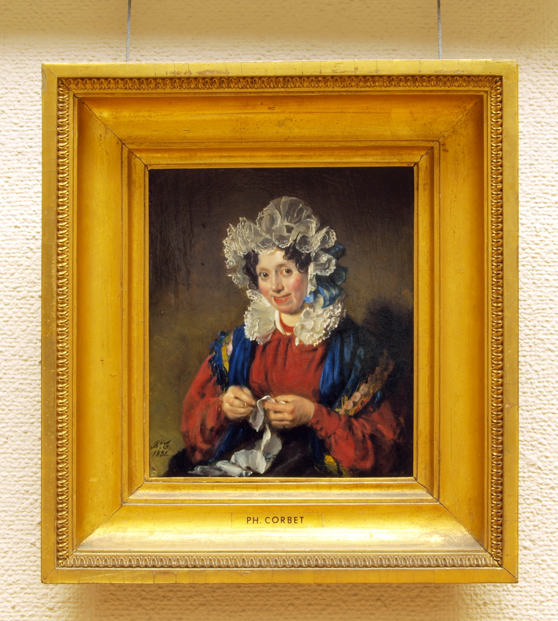 Damesportret